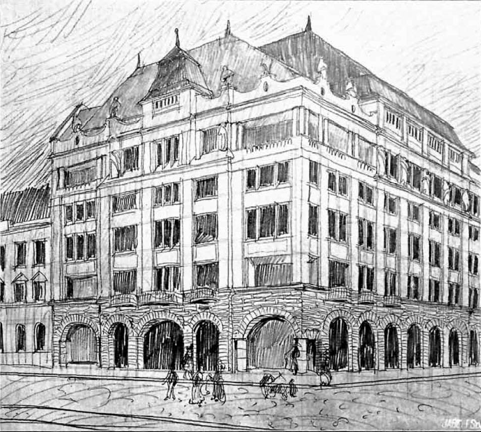 Нереалізований проект готелю "Краківського" на розі вулиці Пекарської і площі Соборної у Львові. Архітектори Генрик Заремба і Рудольф Фелікс Мацура.